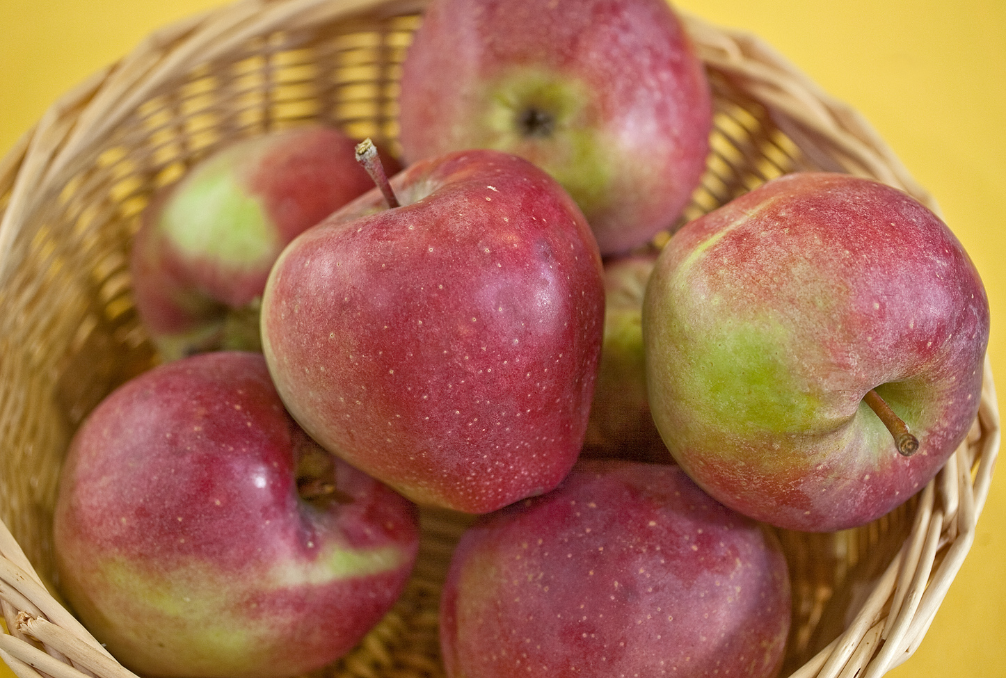 Der Gloster ist eine Apfelsorte